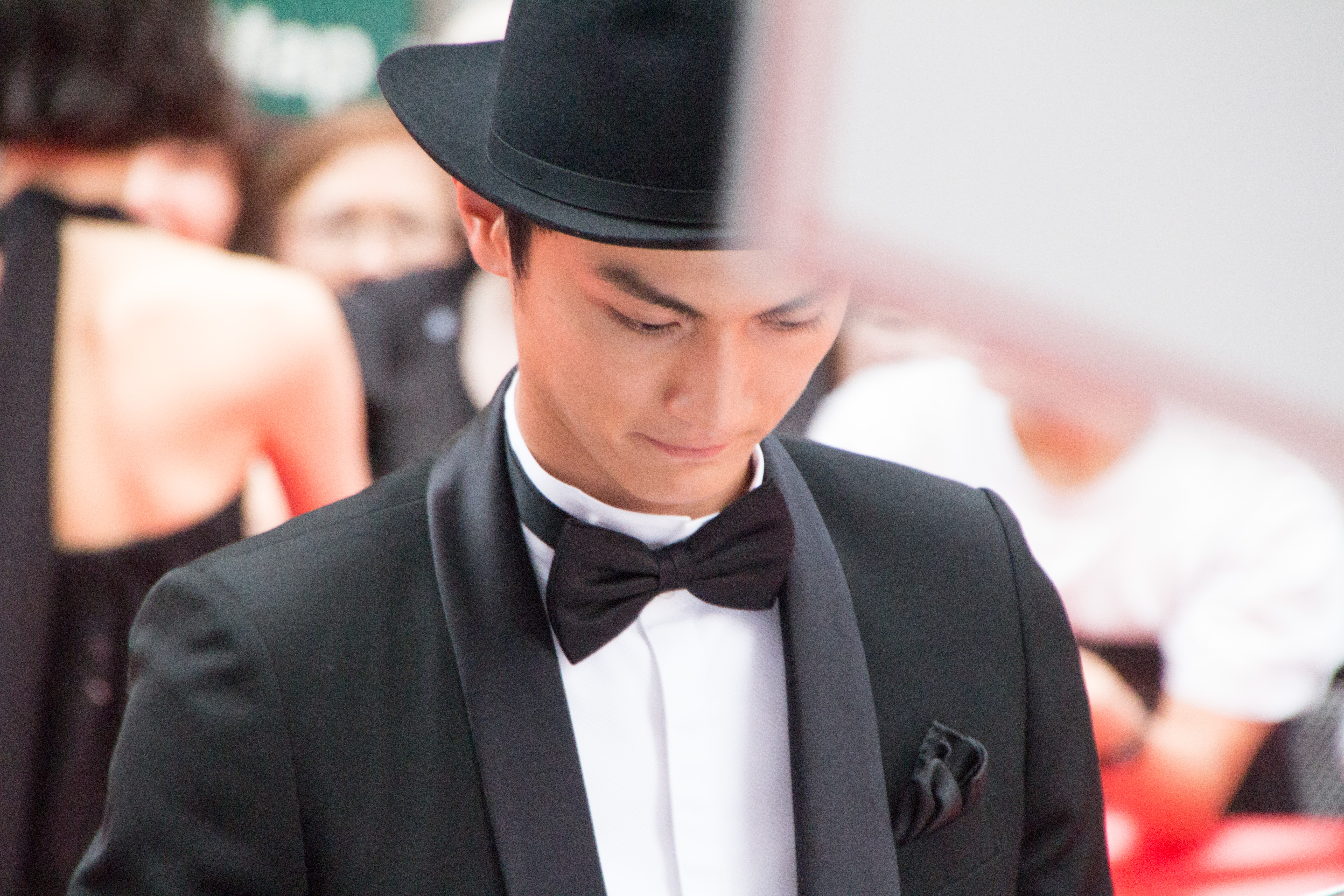 シン・ゴジラ ワールドプレミア レッドカーペットイベント 高良健吾